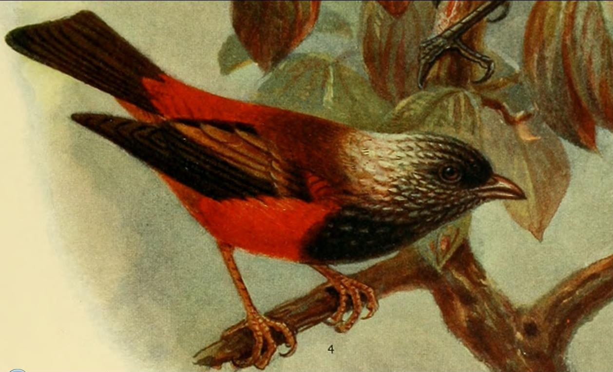 Пальмовая гавайская цветочница